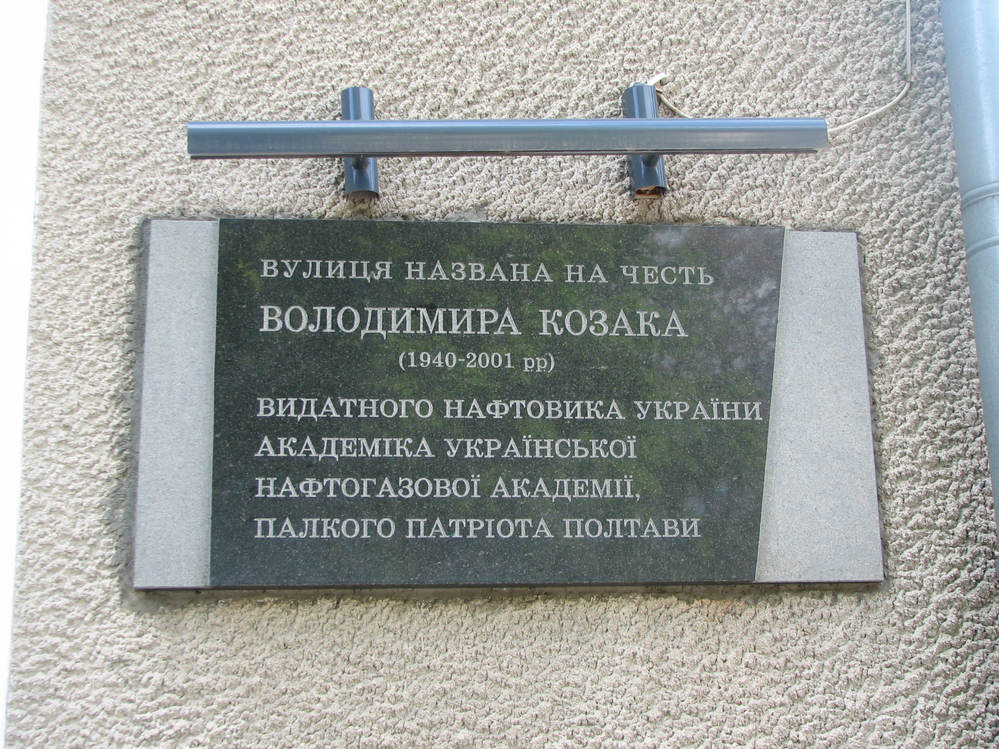 Вулиця названа на честь В.Козака 1940-2001